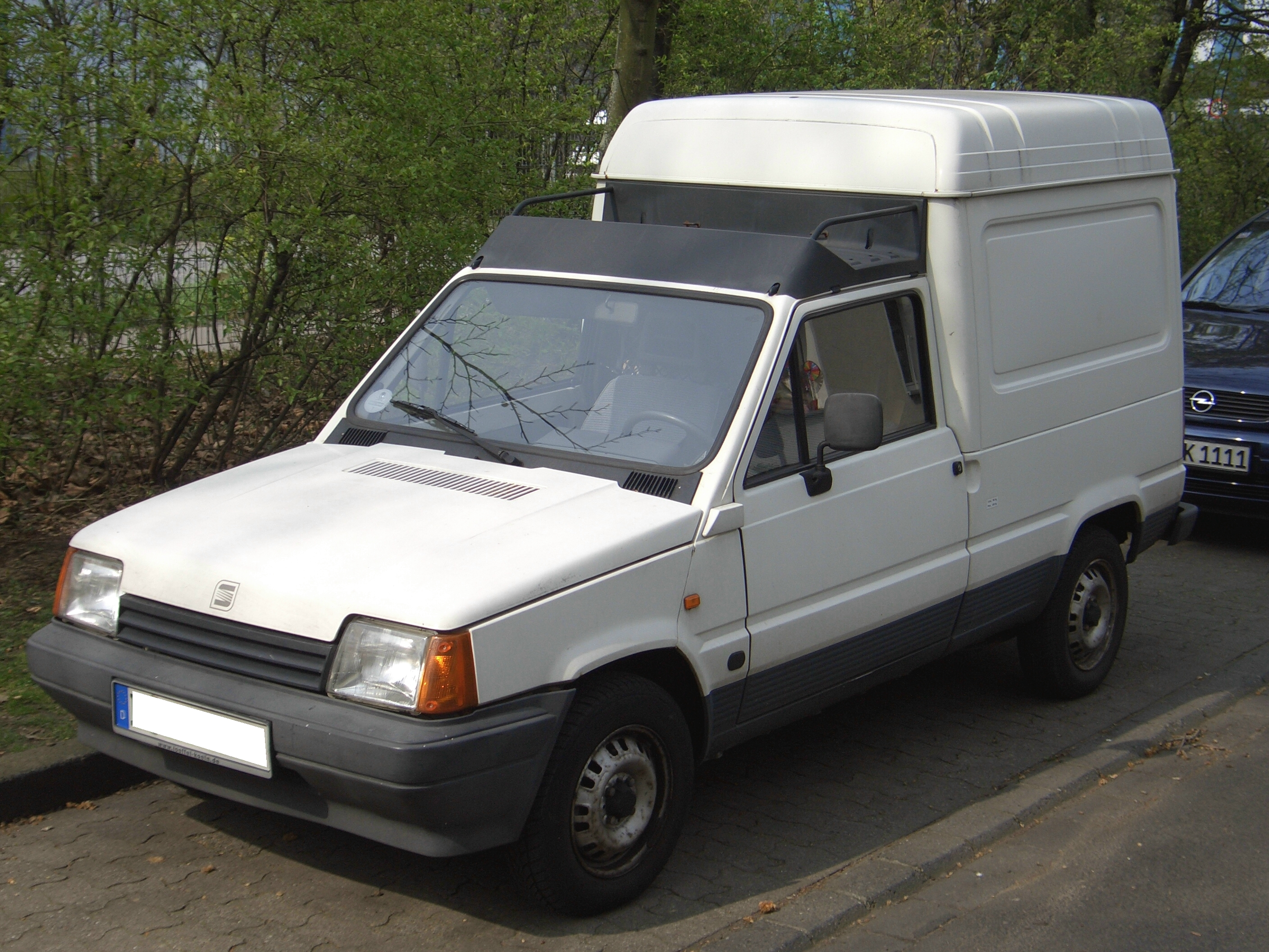 Seat Terra Diesel, closed delivery van, 1983-1995. seen in Duesseldorf, Germany